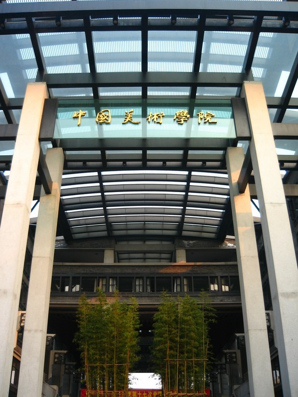 中文（中国大陆）: 中国美院